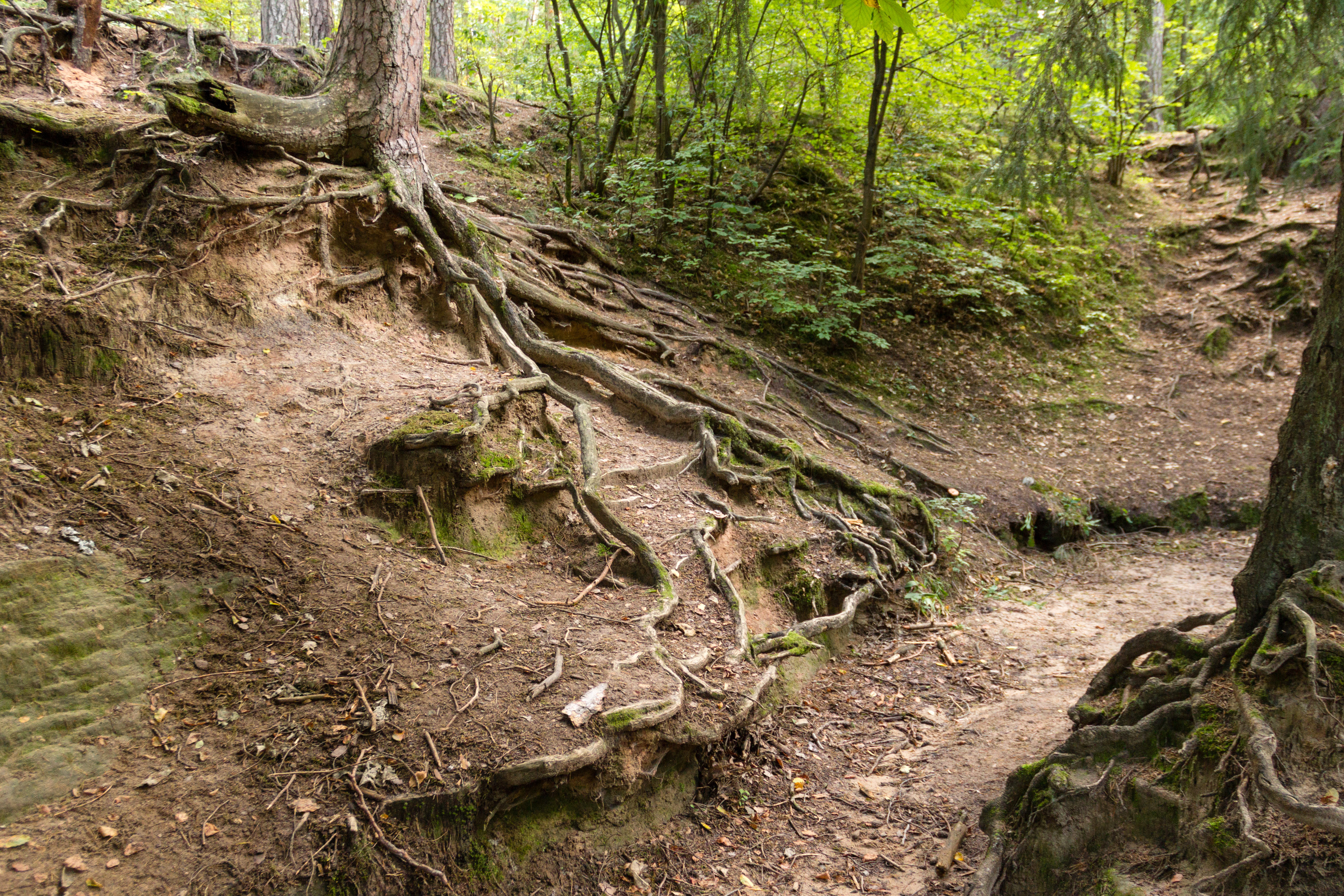 Indianerschlucht, Uttenreuth, Landschaftsschutzgebiet Buckenhof